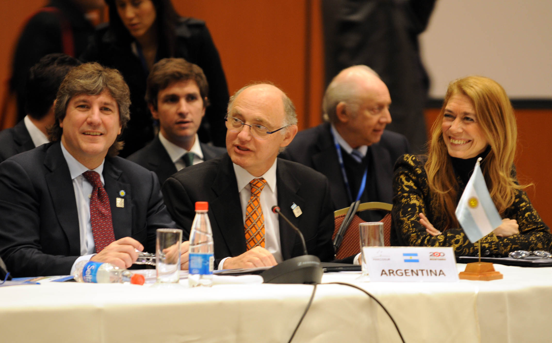 Asunción, Paraguay. Junio 28 de 2011. El Canciller Héctor Timerman participó con el Ministro de Economía Amado Boudou y la Ministra de Industria Débora Giorgi del inicio de la XLI Reunión Ordinaria del Consejo del Mercado Común. Foto: Roberto Daniel Garagiola